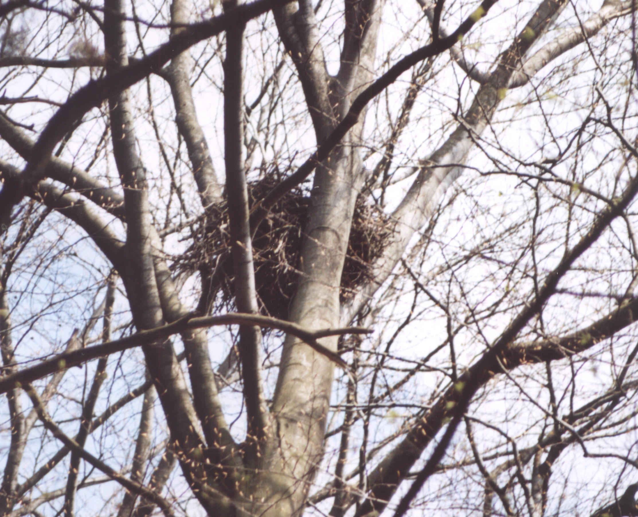 fragment rezerwatu przyrody Rajchowa Góra - gniazdo myszołowa zwyczajnego